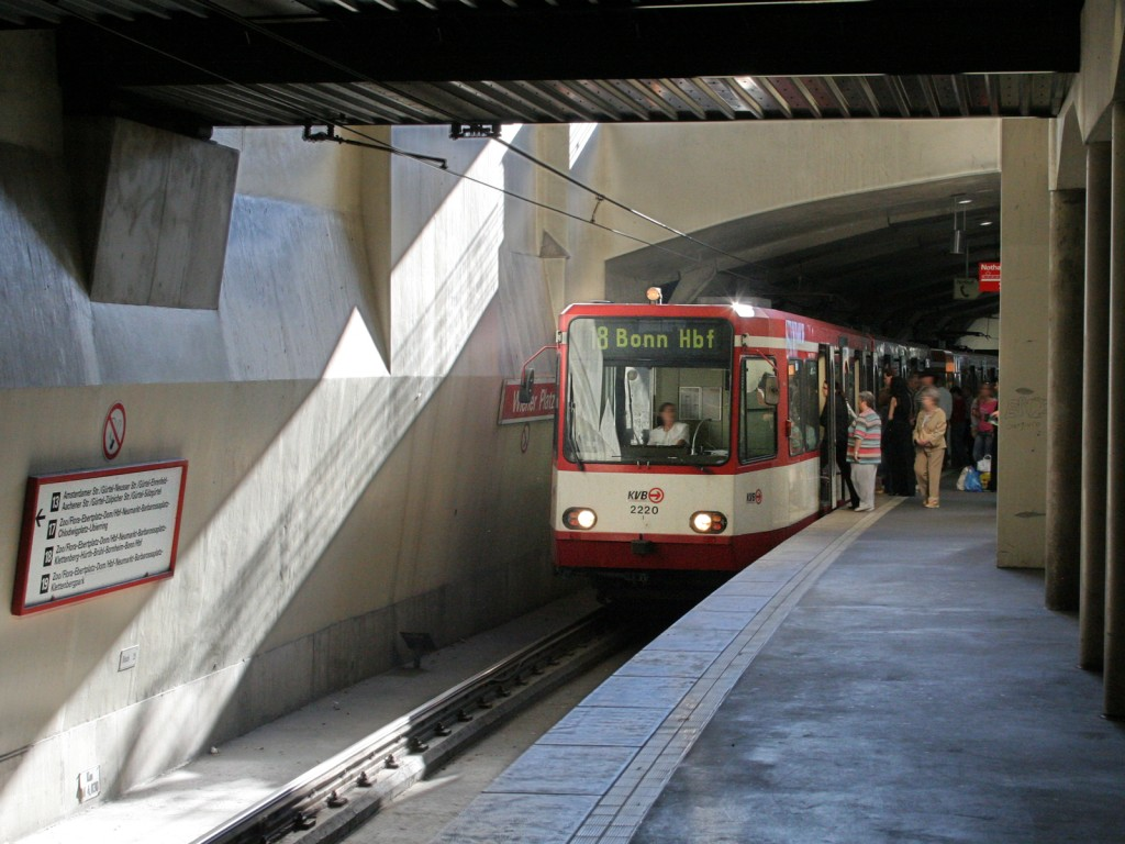 Haltestelle Mülheim, Wiener Platz